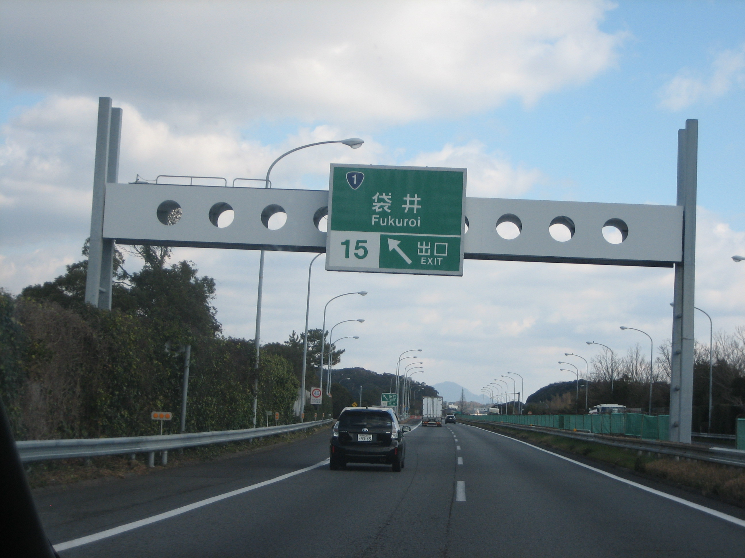 袋井IC